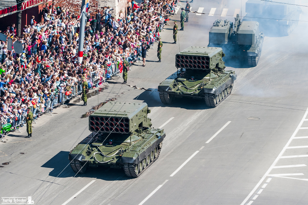 Парад в честь 70-летия Победы в Великой Отечественной войне. Нижний Новгород. Площадь Минина и Пожарского